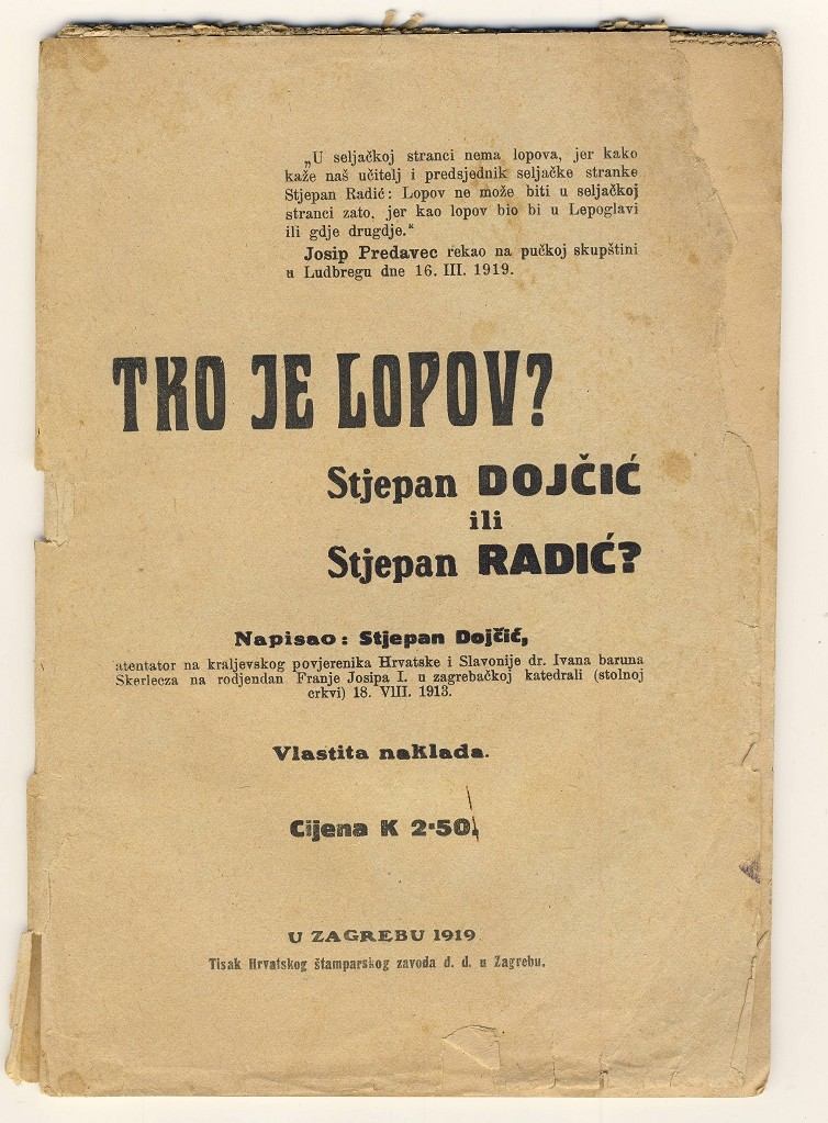 Srpskohrvatski / српскохрватски: Spis Stjepana Dojčića, "Tko je lopov?" iz 1919. godine.